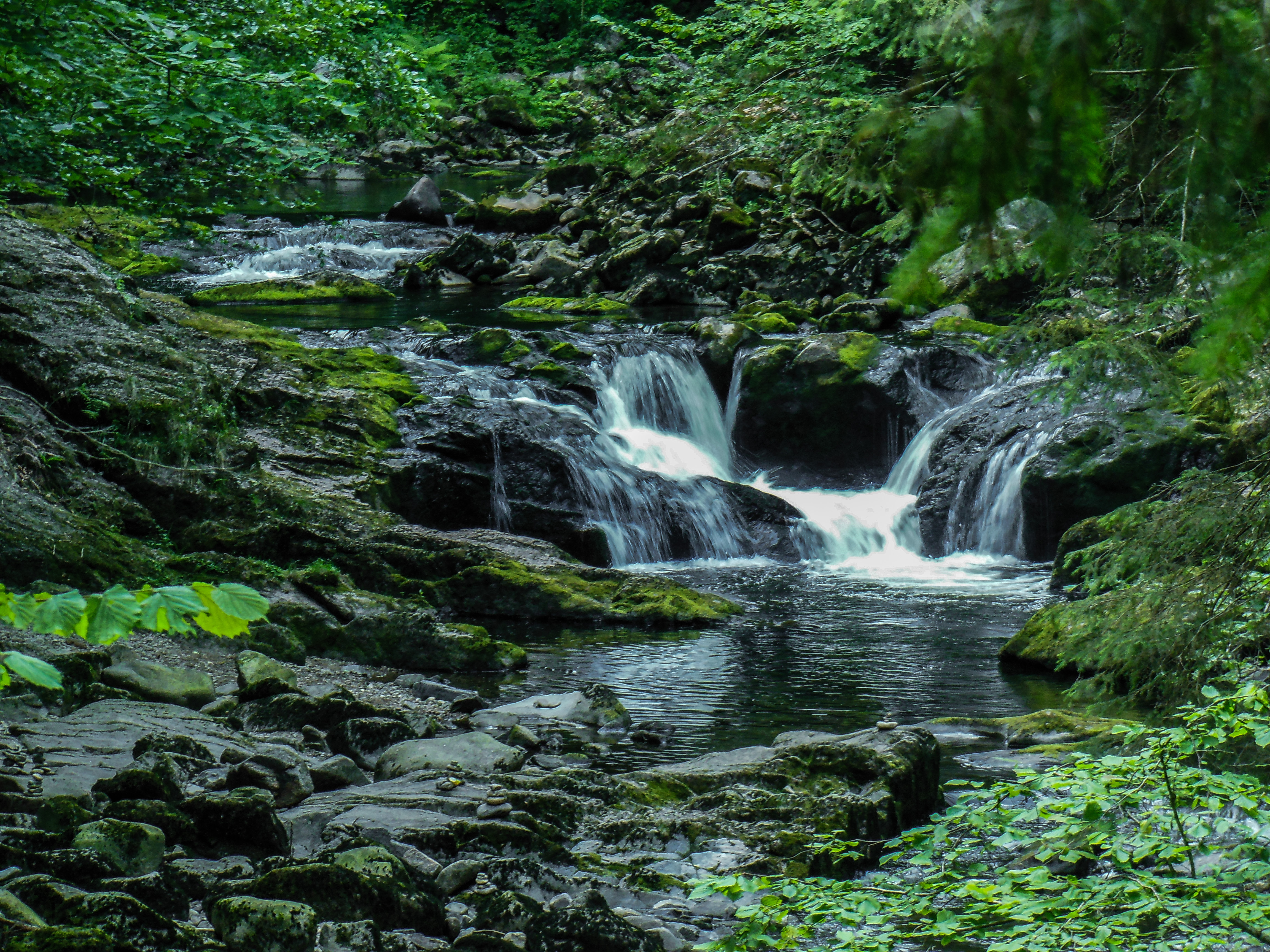 (LSG:BY-LSG-00096.01)_Schutz des Landschaftsteils Buchberger Leite und Reschbachleite, im Bereich der Gemeinden Freyung, Hohenau, Kumreut und Wasching, Landkreis Wolfstein